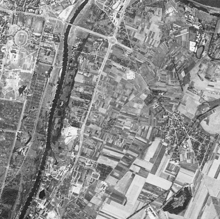 Tereny poznańskiego Nowego Miasta sfotografowane przez amerykańskiego satelitę wywiadowczego KH-4A 1023, 23 sierpnia 1965 r. Widoczny stadion im. Szyca, Warta, rondo Rataje, obszar Żegrza, Starołęki, a także Fort II Twierdzy Poznań.